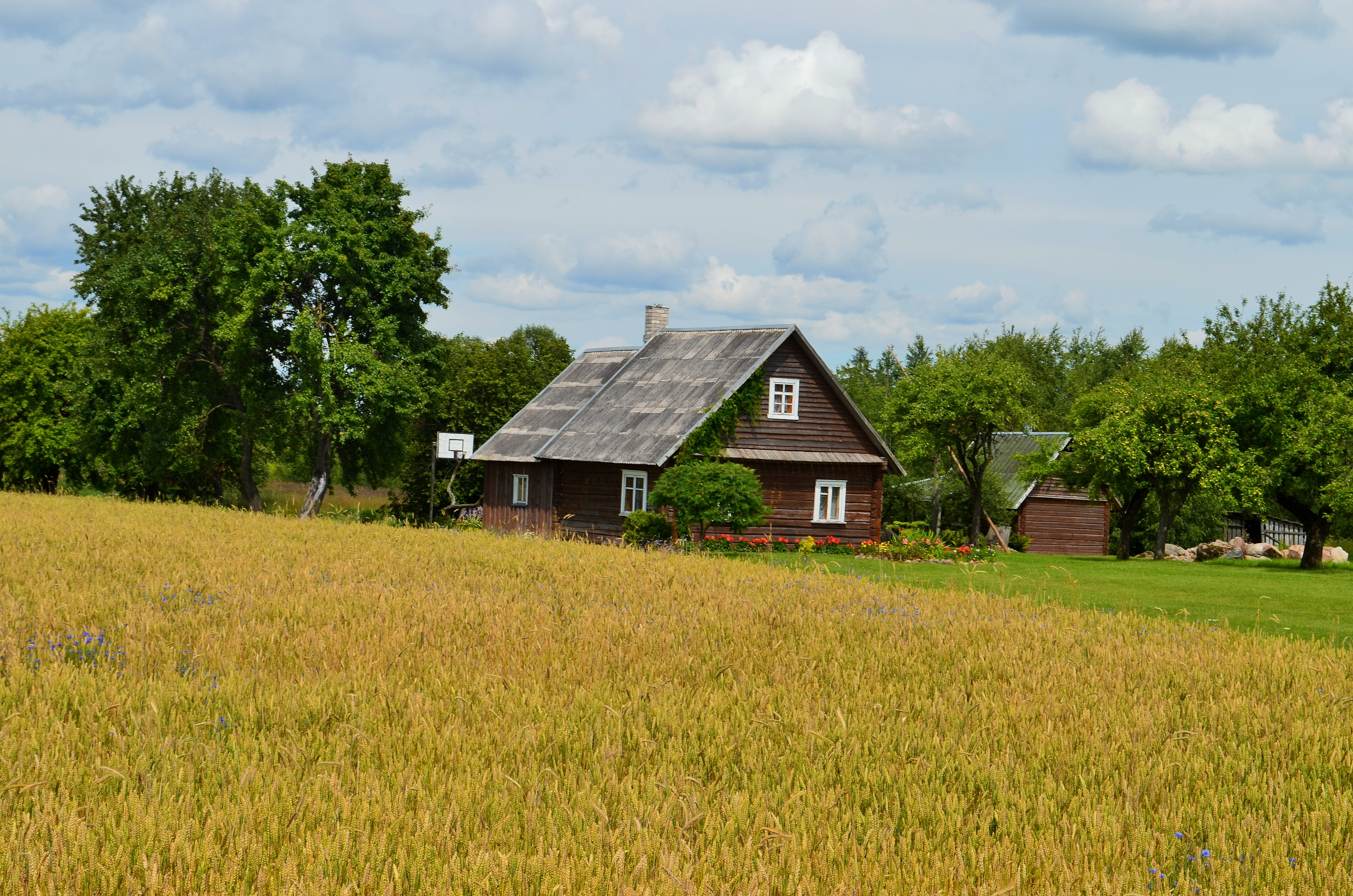 Miliūnų sodyba, Ukmergės raj.